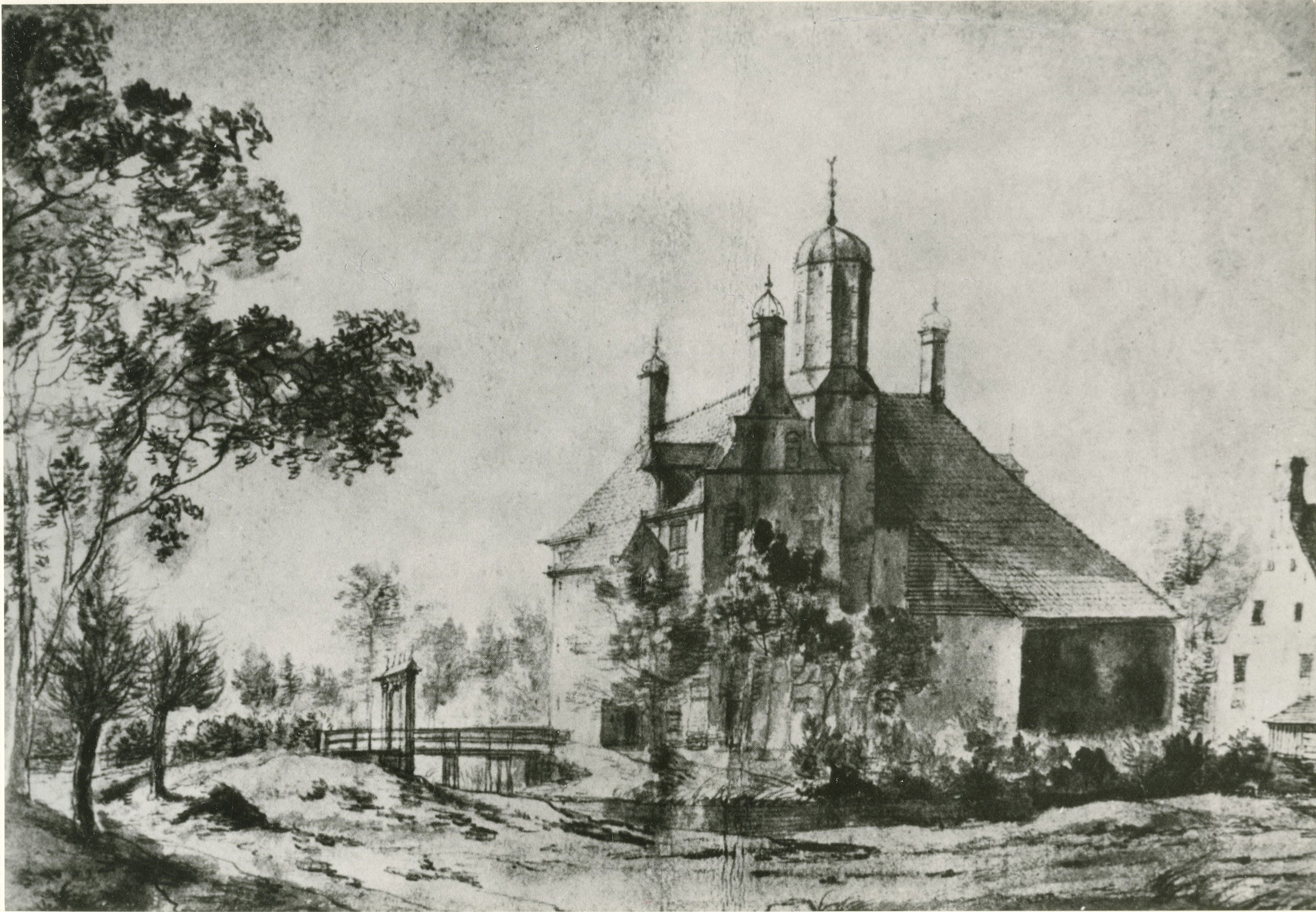 Een tekening van mogelijk de Hanckemaborg van Jan Abrahamsz. van Beerstraten. Er bestaat twijfel over zowel de toeschrijving aan de auteur als aan het feit of het werkelijk de Hanckemaborg betreft.